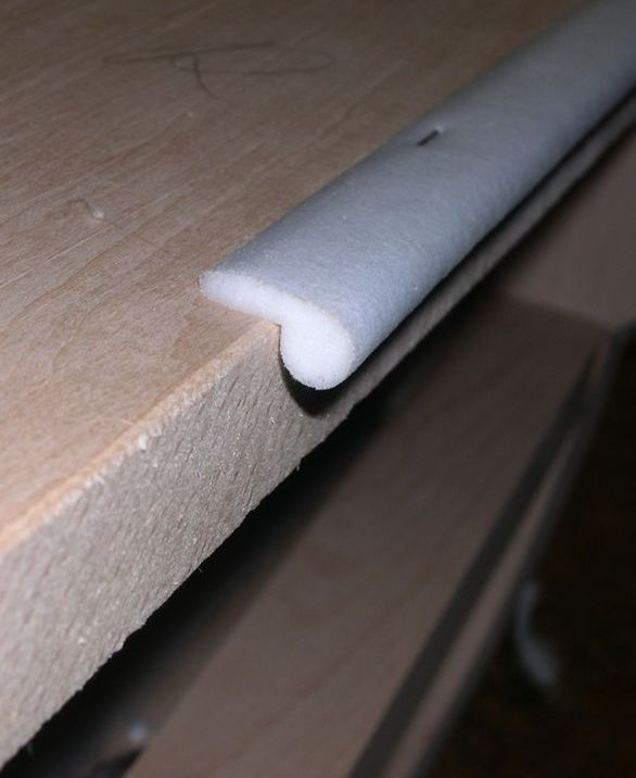 geheftetes Bourle